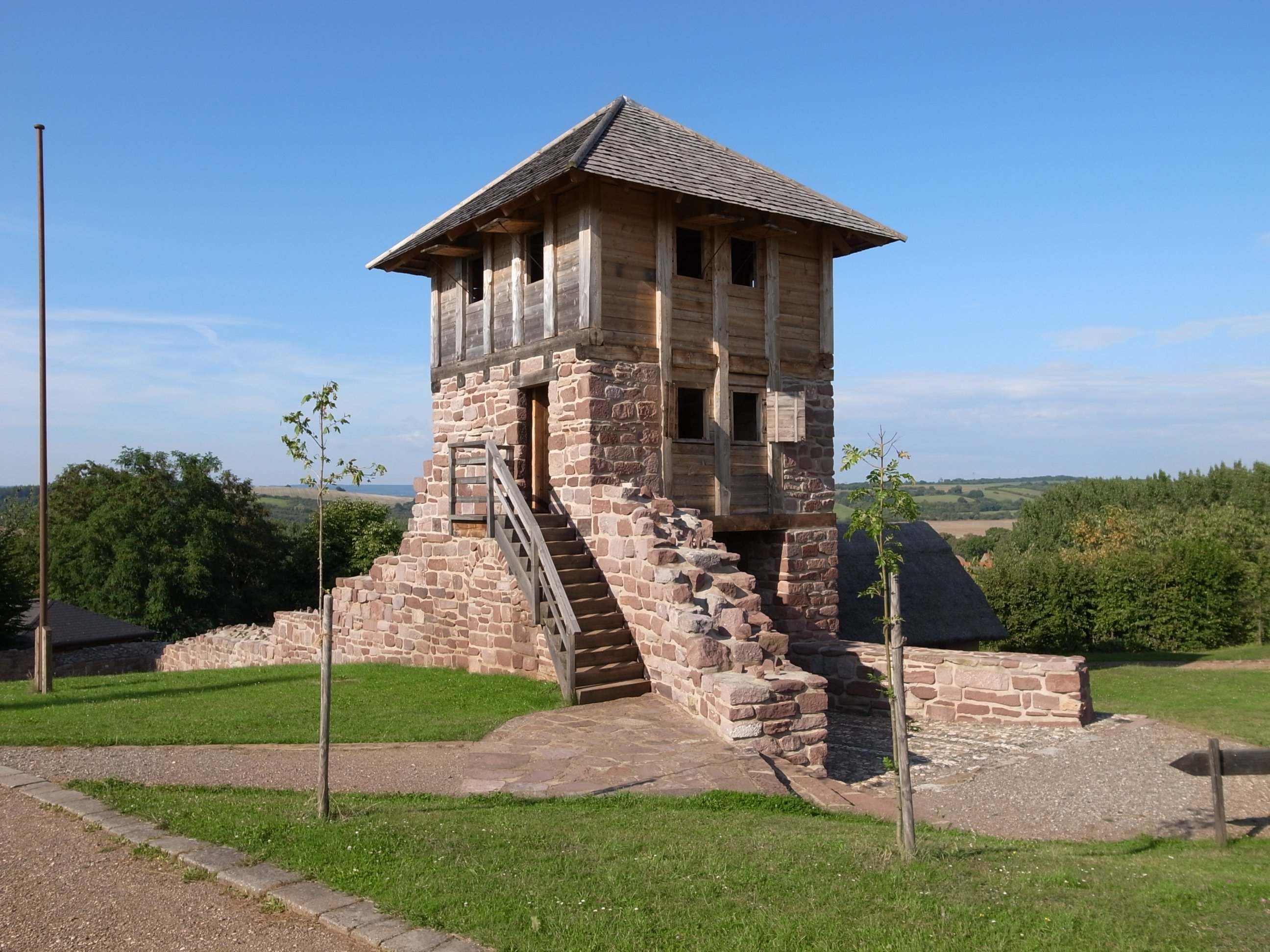 Königspfalz Tilleda,Rekonstruiertes Zangentor